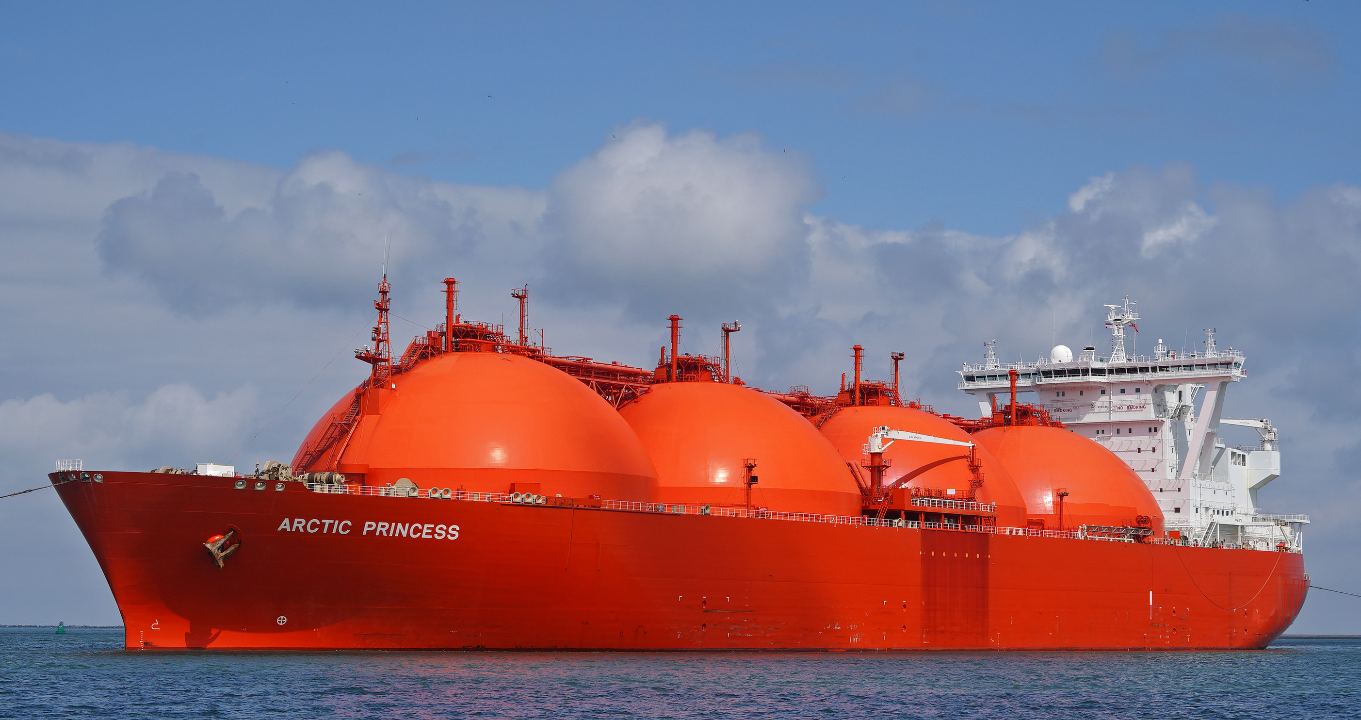 Europoort 1-8-2019 , SMIT CHEETAH , SMIT PANTHER , ROTTERDAM en VENUS assisteerden de LNG tanker ARCTIC EXPRESS naar haar ligplaats in de Nijlhaven